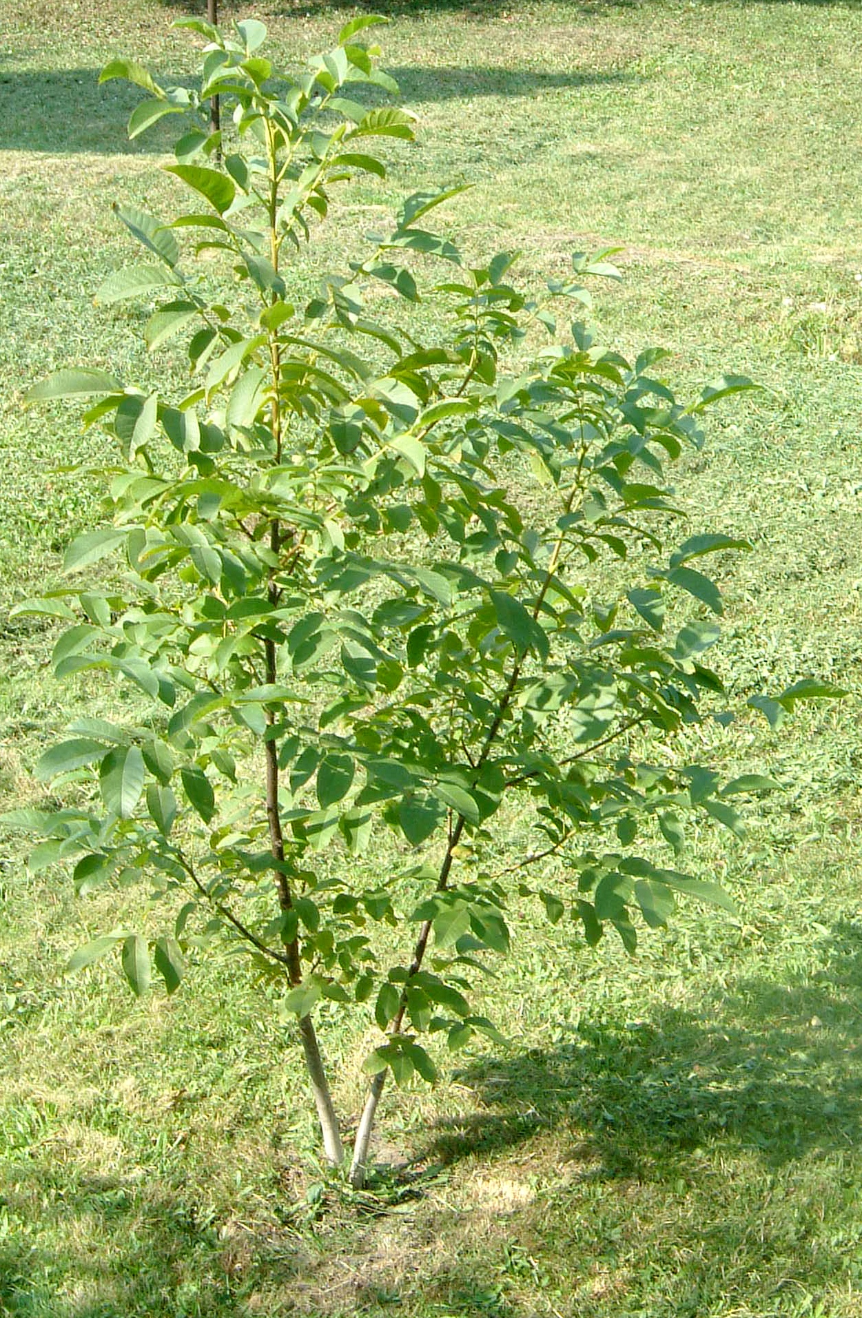 Walnussbäumchen